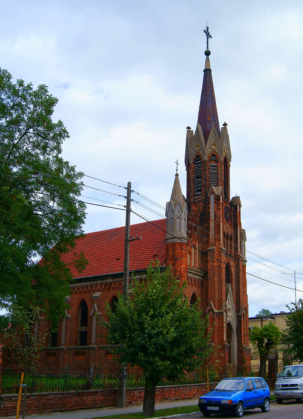 Izbica Kujawska, ul. Narutowicza 4 - dawny kościół ewangelicki, k. XIX (obecnie własność prywatna)